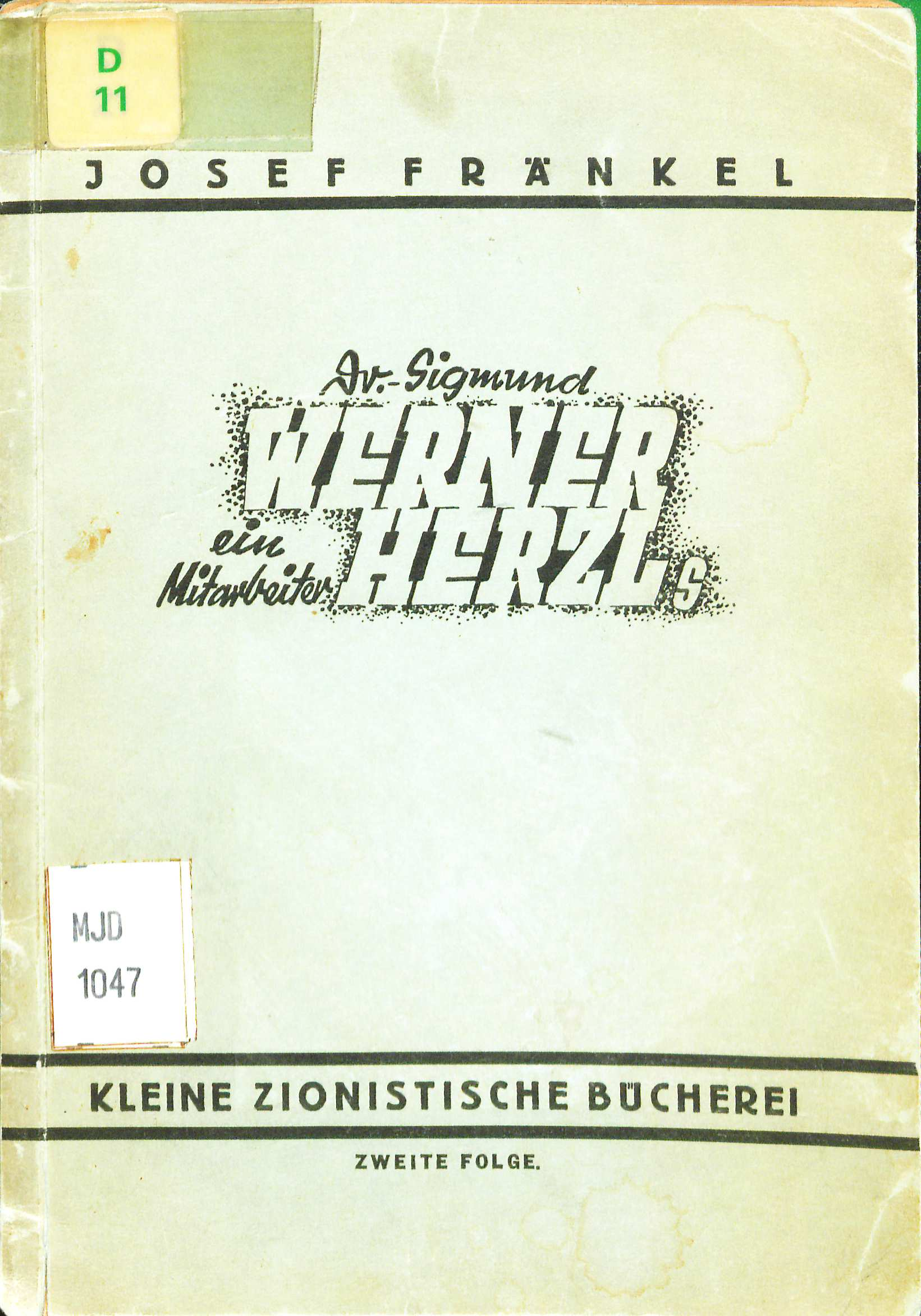 Josef Fränkel: Dr. Siegmund Werner : ein Mitarbeiter Herzls. Briefe von S. Werner und T. Herzl. Ausgewählt und herausgegeben von Josef Fränkel. Prag : Zionistische Propagandastelle, 1938, Umschlag